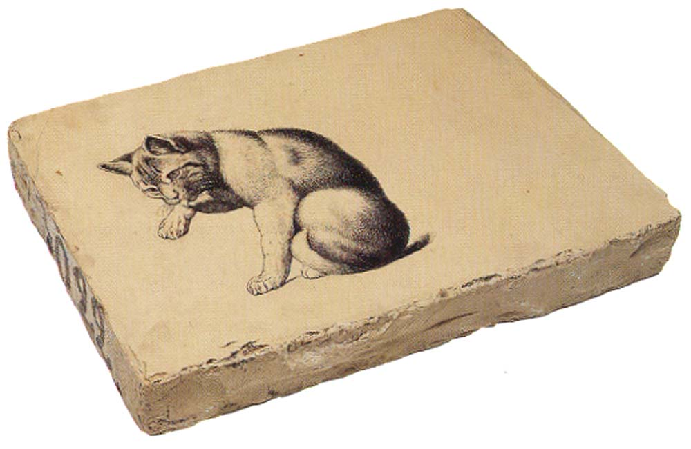 Lithografiestein mit Werbung für Hoffmanns Stärkefabrik, Bad Salzuflen